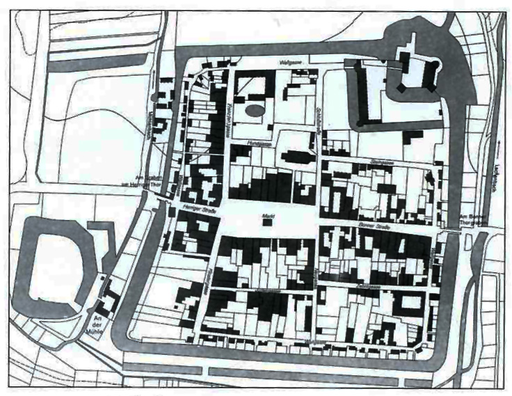 Lechenich, franz. Katasterkarte aus dem Jahr 1811